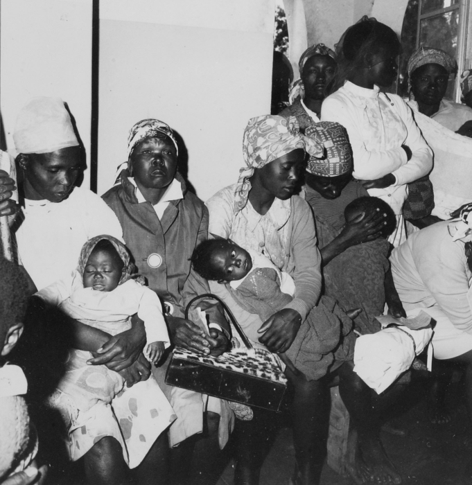 De afkorting Kneporos staat voor: Kenya-Netherlands Project for Operational Research on Outpatient Services.